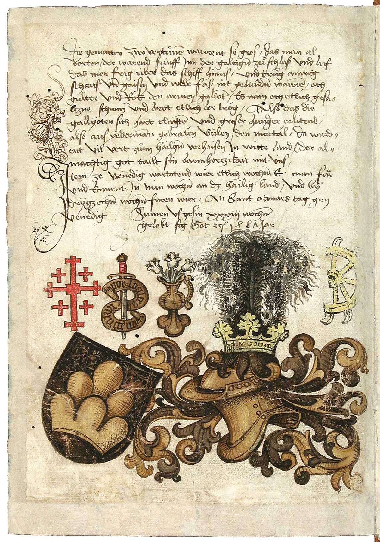 Schilderung einer Pilgerreise von Konstanz nach Jerusalem durch Konrad von Grünenberg, um 1487 Konrad von Grünenberg: Beschreibung der Reise von Konstanz nach Jerusalem - Cod. St. Peter, pap. 32. Handschrift, Bodenseegebiet (Konstanz?), um 1487. II + 53 Blätter, 32x21, mit 31 kolorierten Zeichnungen der Reiseroute von Venedig bis Palästina. Text in alemannischer Mundart.